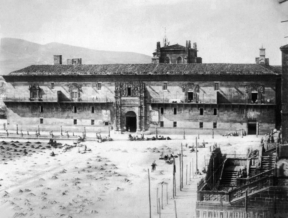 Panorámica da praza do Obradoiro. Un insólito Obradoiro en terra, cuns paus ergueitos diante da escalinata da catedral que poderían ser parte da tremoia dos fogos do Apóstolo. E, ao fondo, tralo Hospital Real, un Monte Pedroso espido, sen árbores, pois tal era no século XIX. Estamos, polo tanto, ante unha das fotografías máis antigas de Galicia.